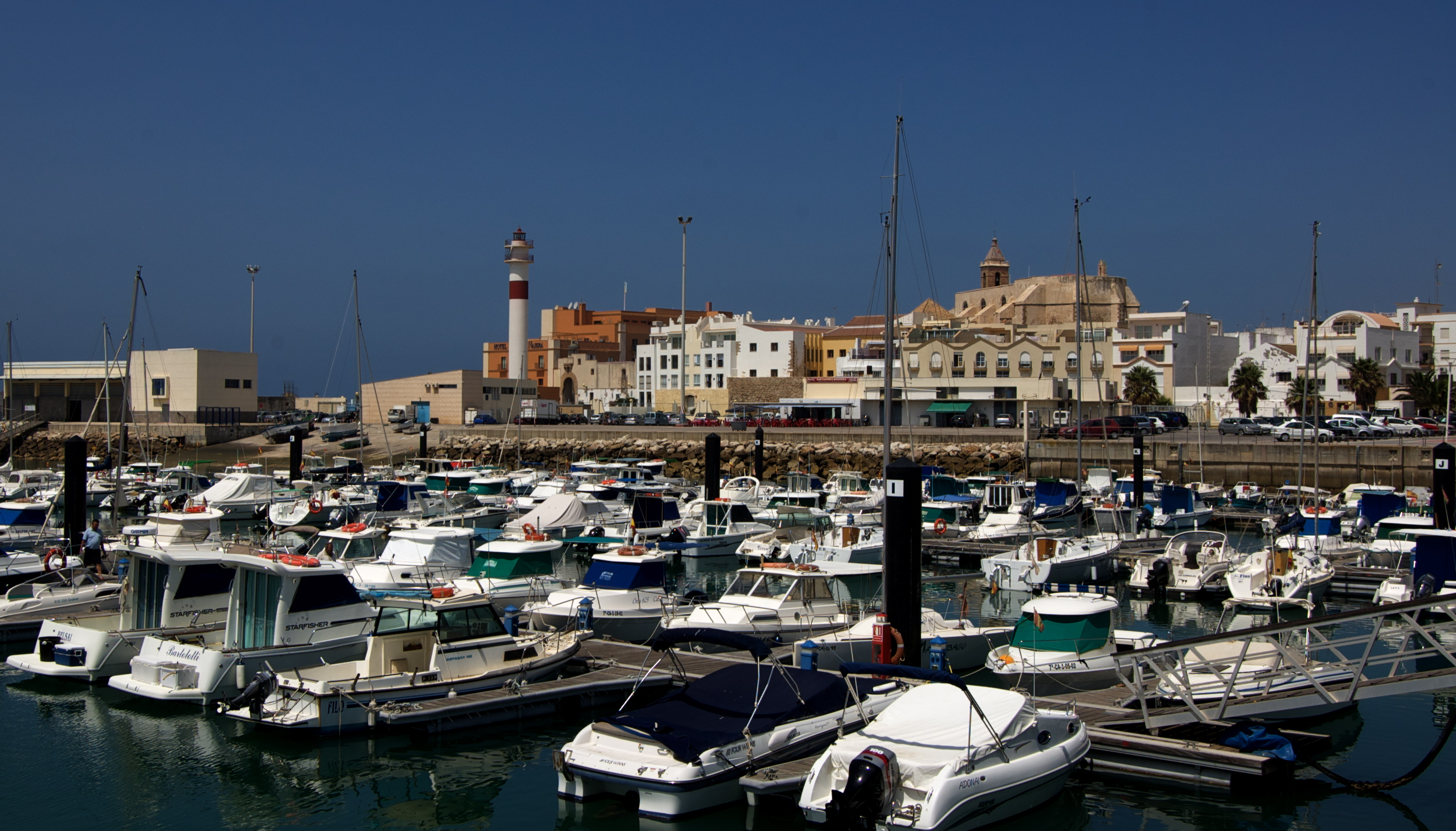 puerto de rota